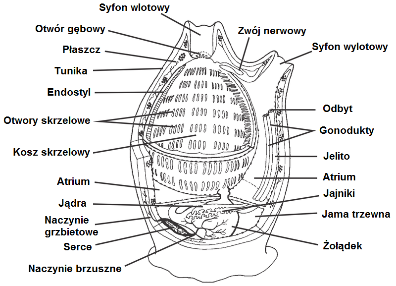 anatomia osłonicy z gromady Ascidiacea